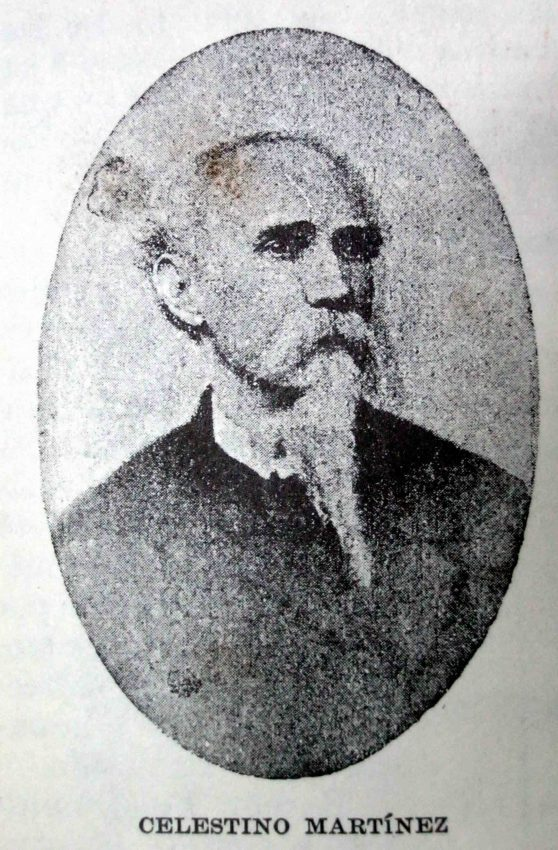 Retrato de Celestino Martínez